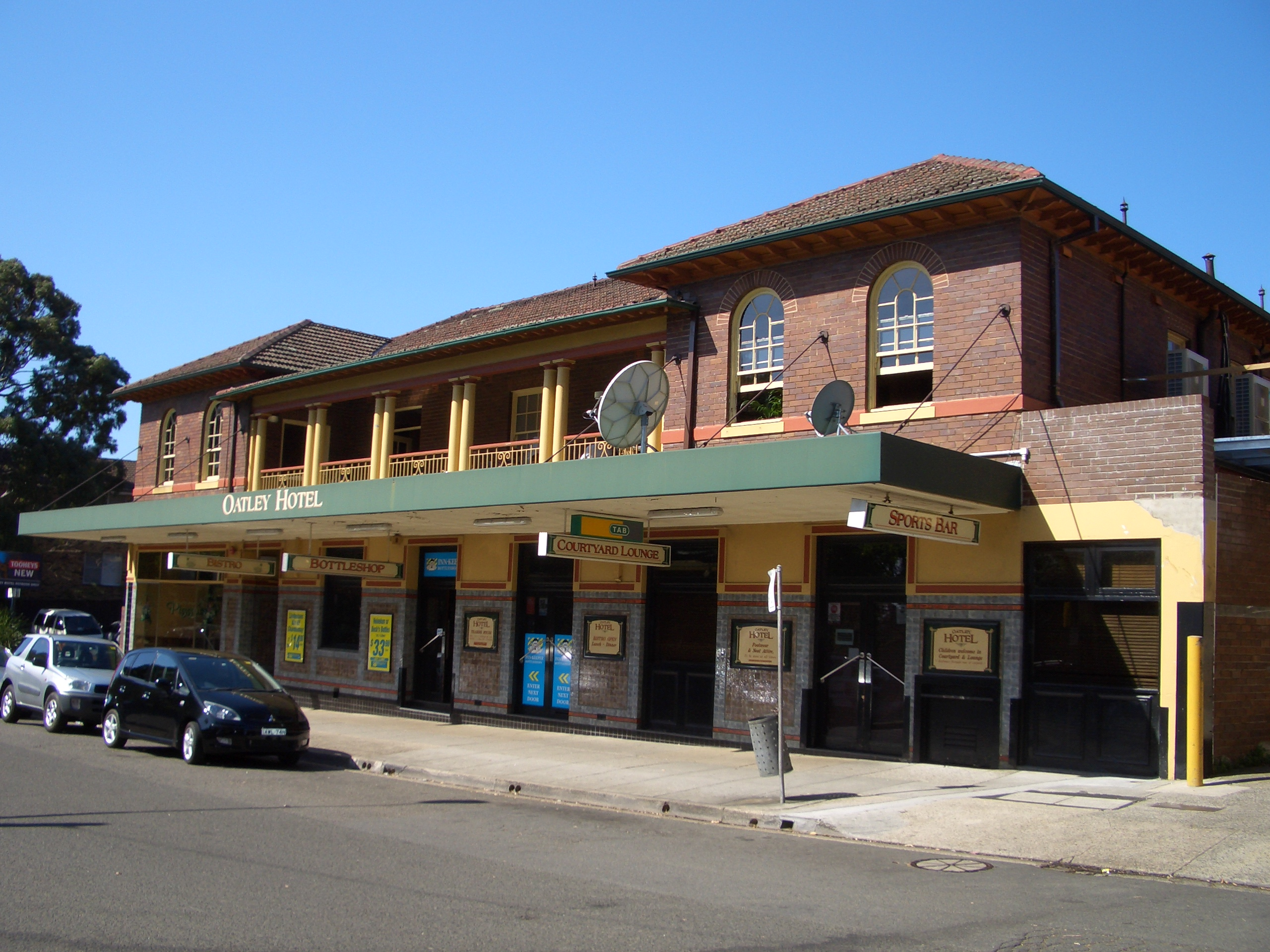 Oatley Hotel, Oatley Avenue